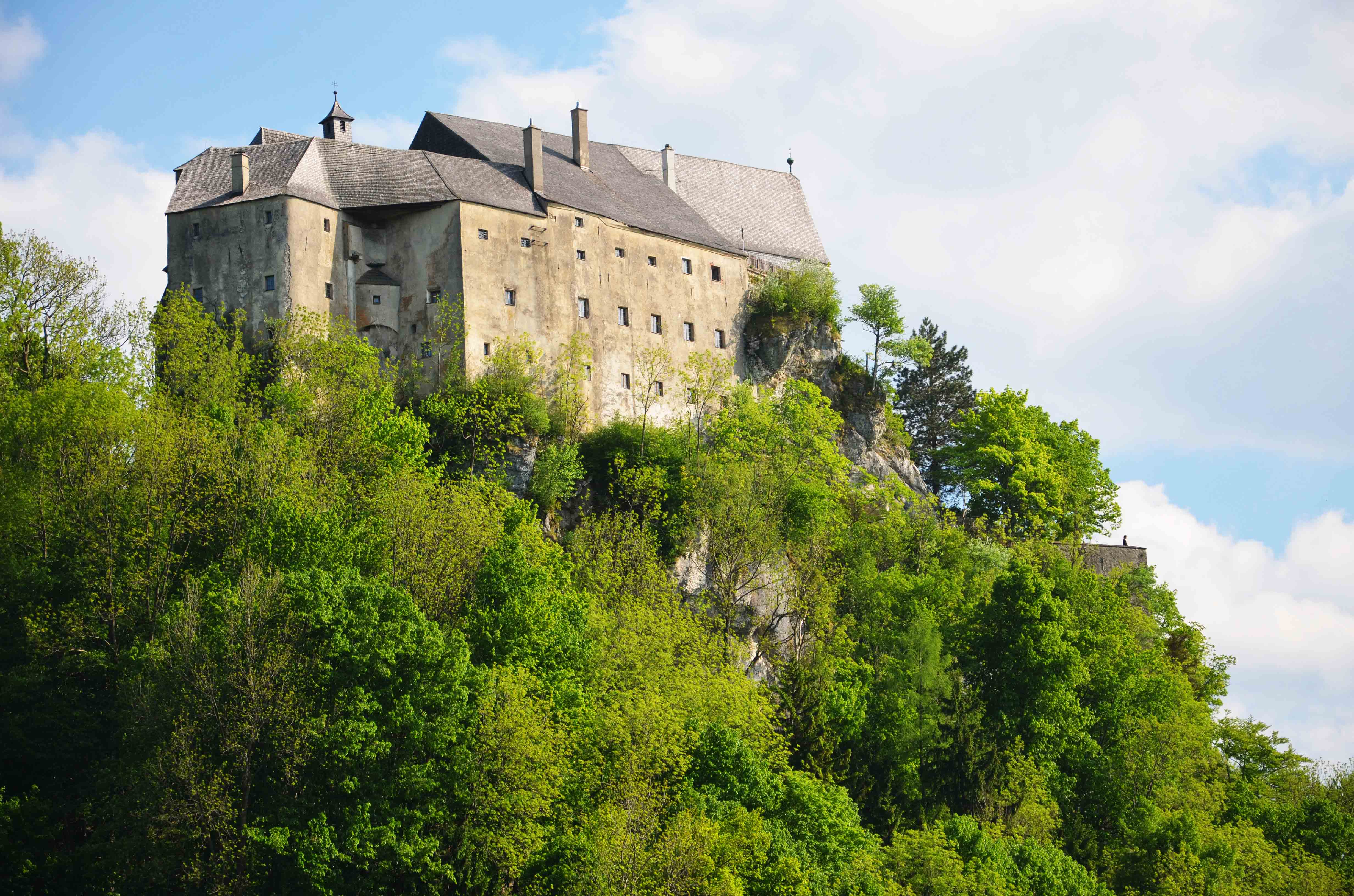 Die Burg Altpernstein mit den Steilwänden zur Talseite.